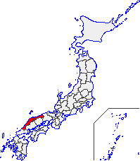 山陰地方の位置